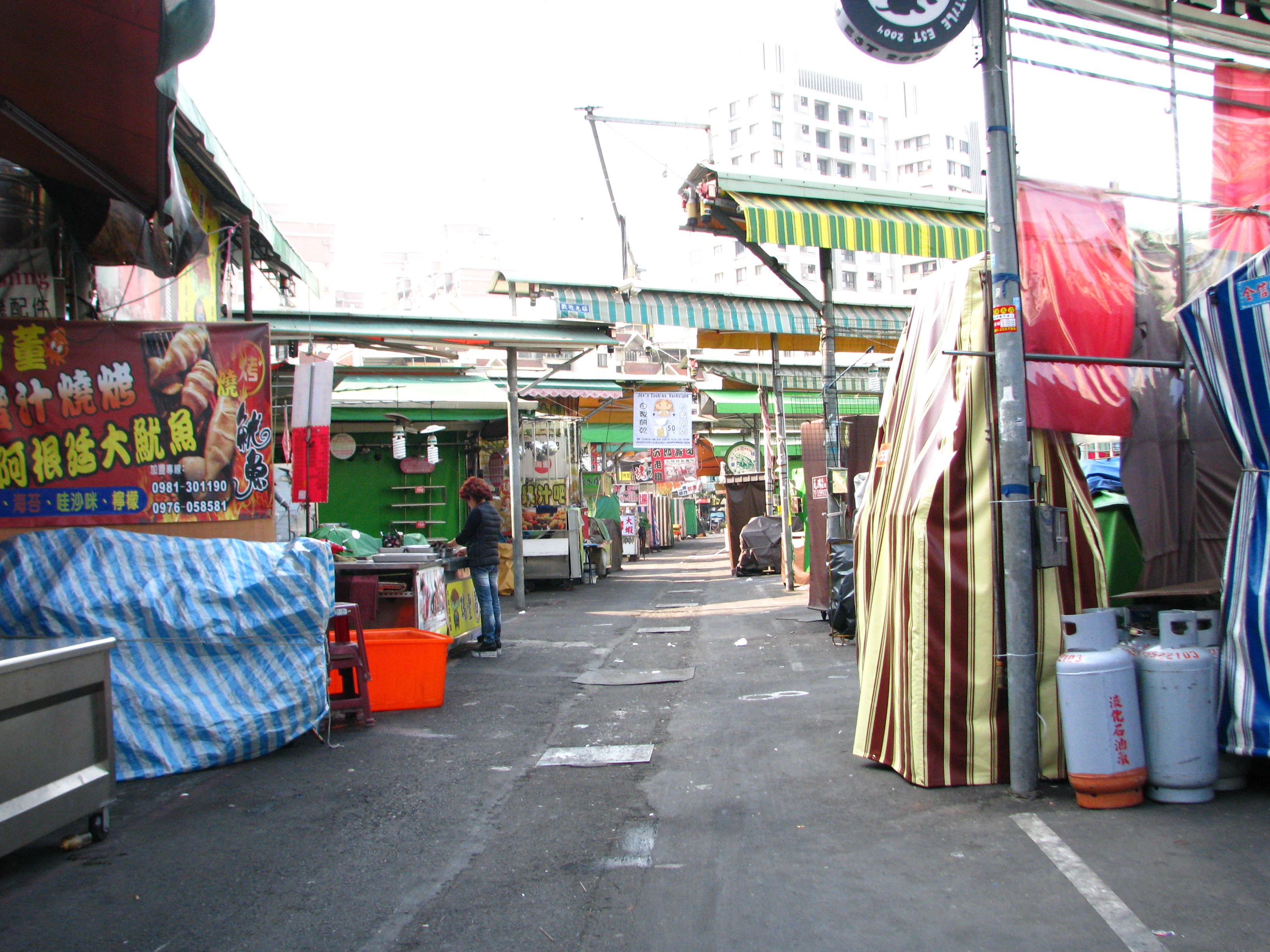 中文（台灣）: 瑞豐夜市內部走道，雙城古道之路廊。